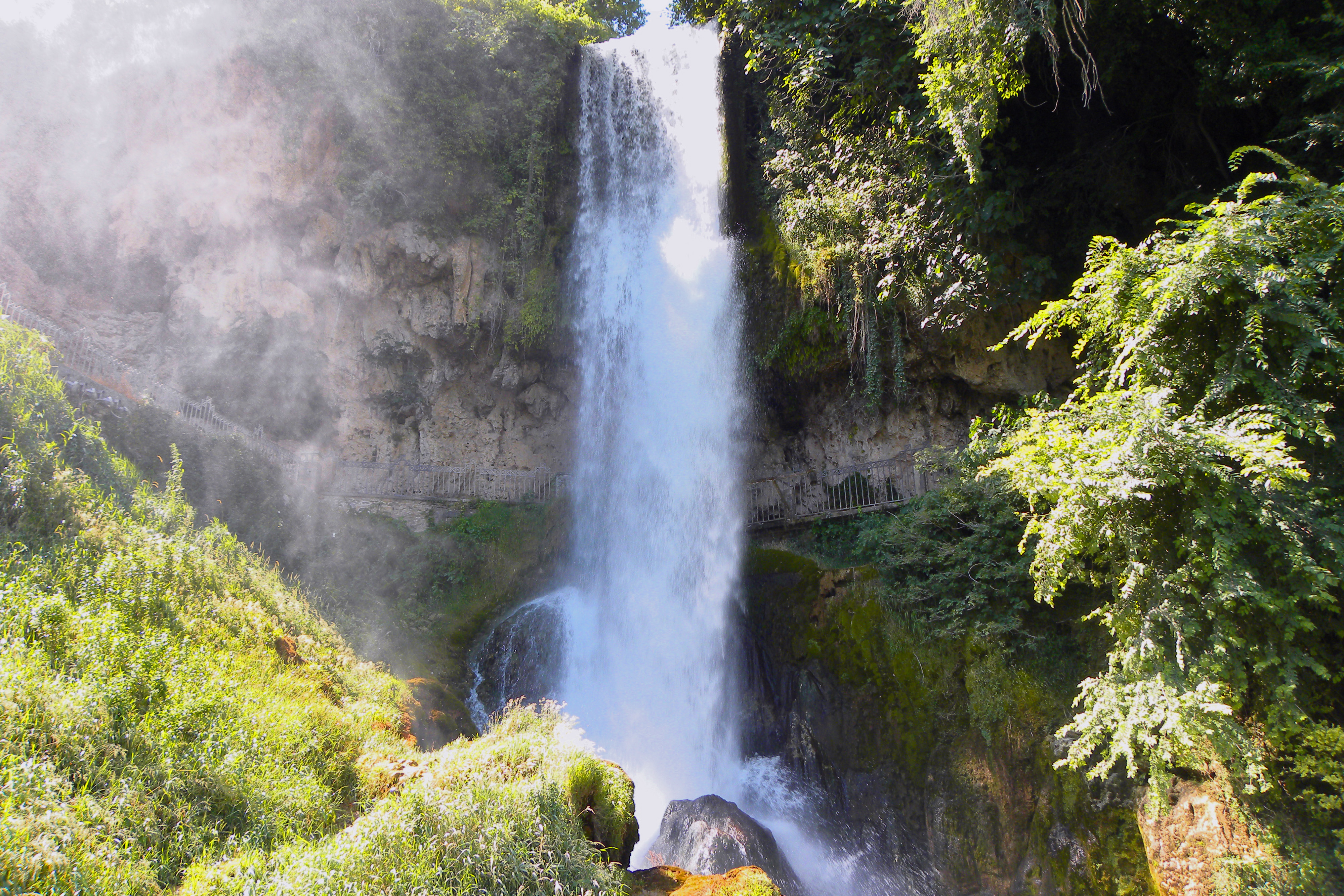 Έδεσσα